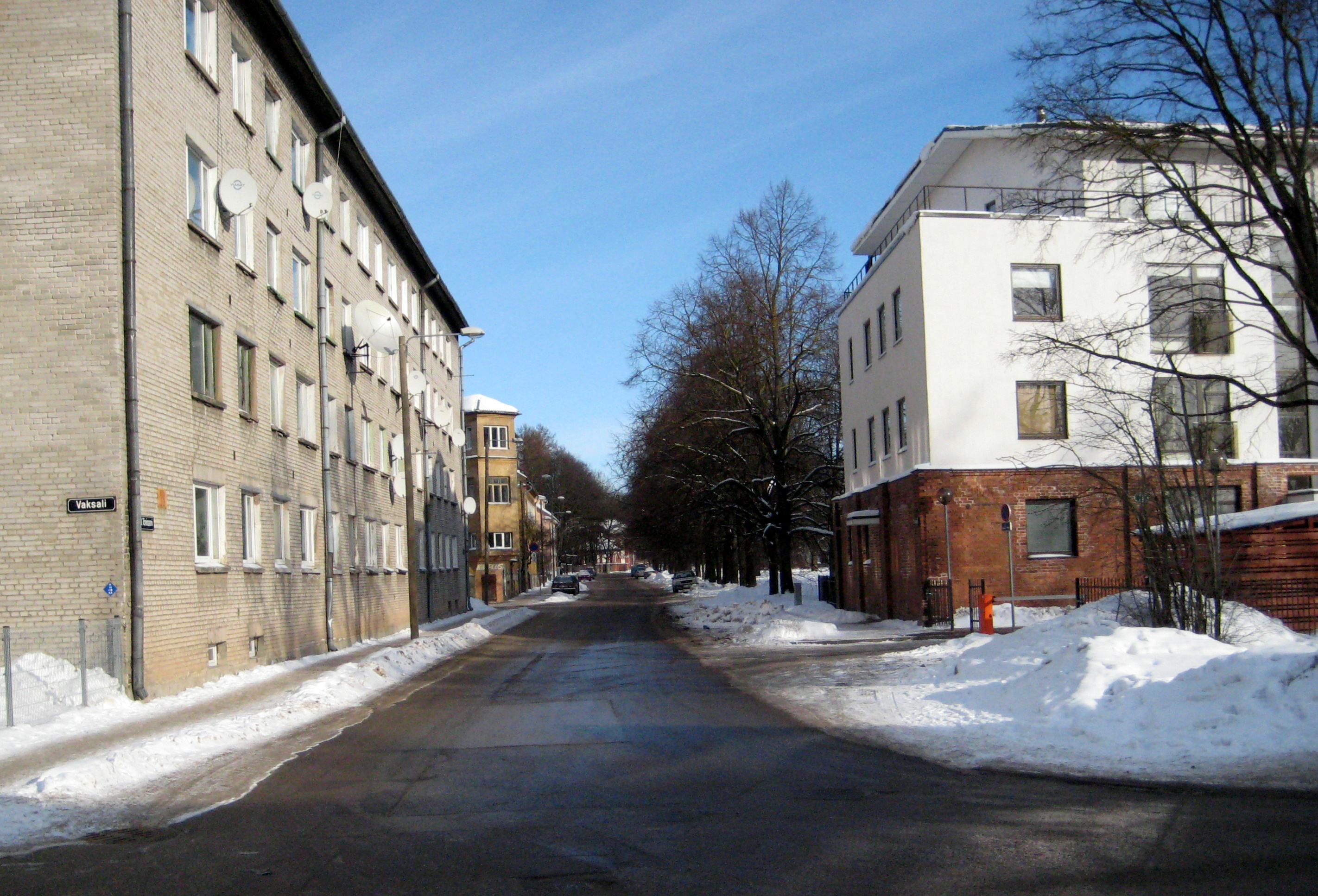 Jaan Tõnissoni tänav Vaksali tänava poolt, Tartu